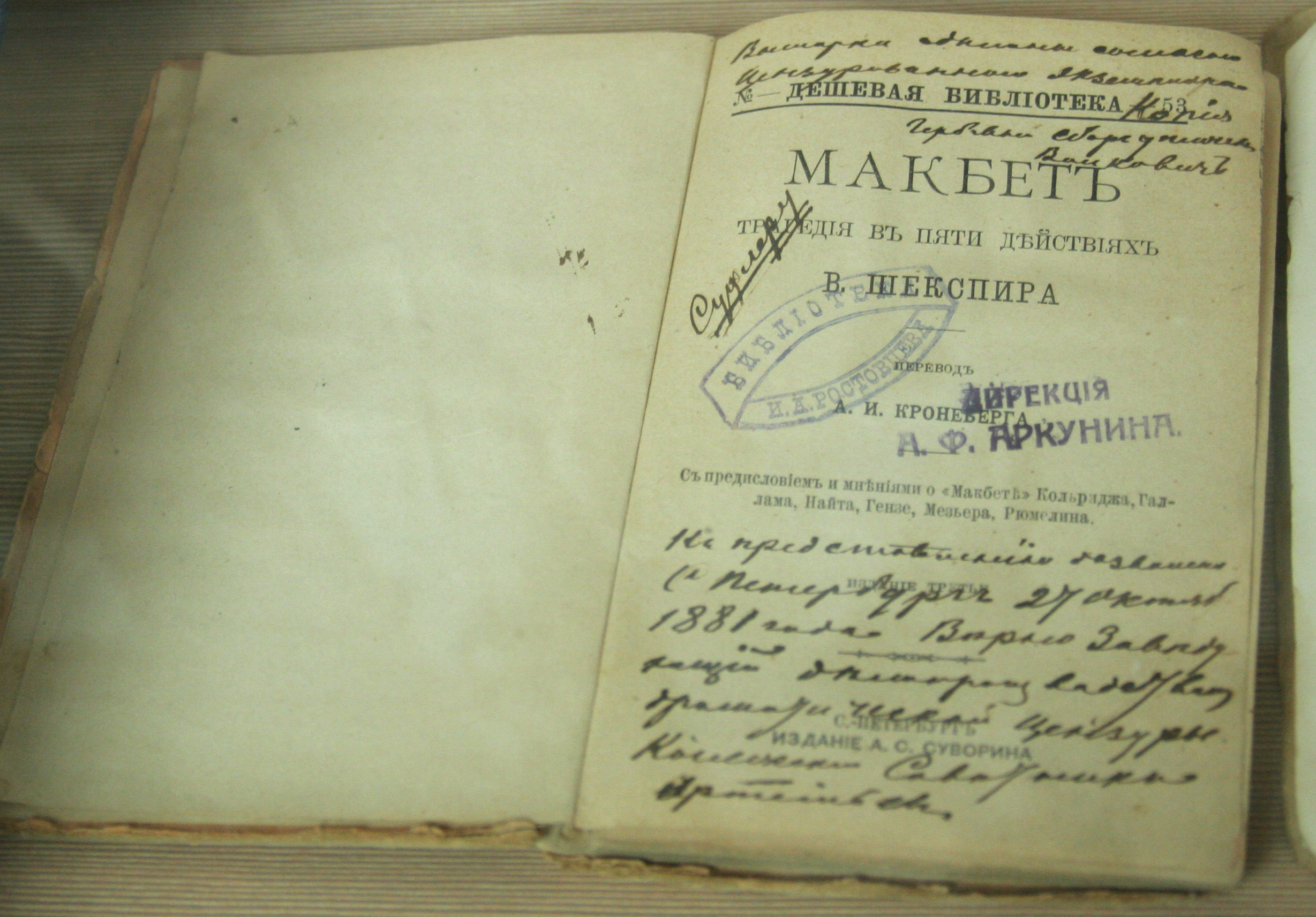 Книга XIX века, издание Суворина. Макбет Шекспира